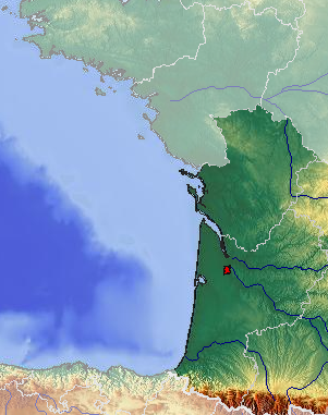 Littoral atlantique français, le Grand Sud-Ouest français étant en surbrillance